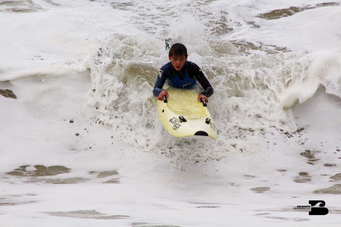 Nipper board